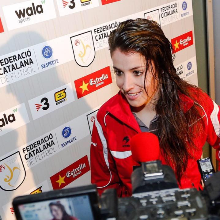 Olga Garcia Perez